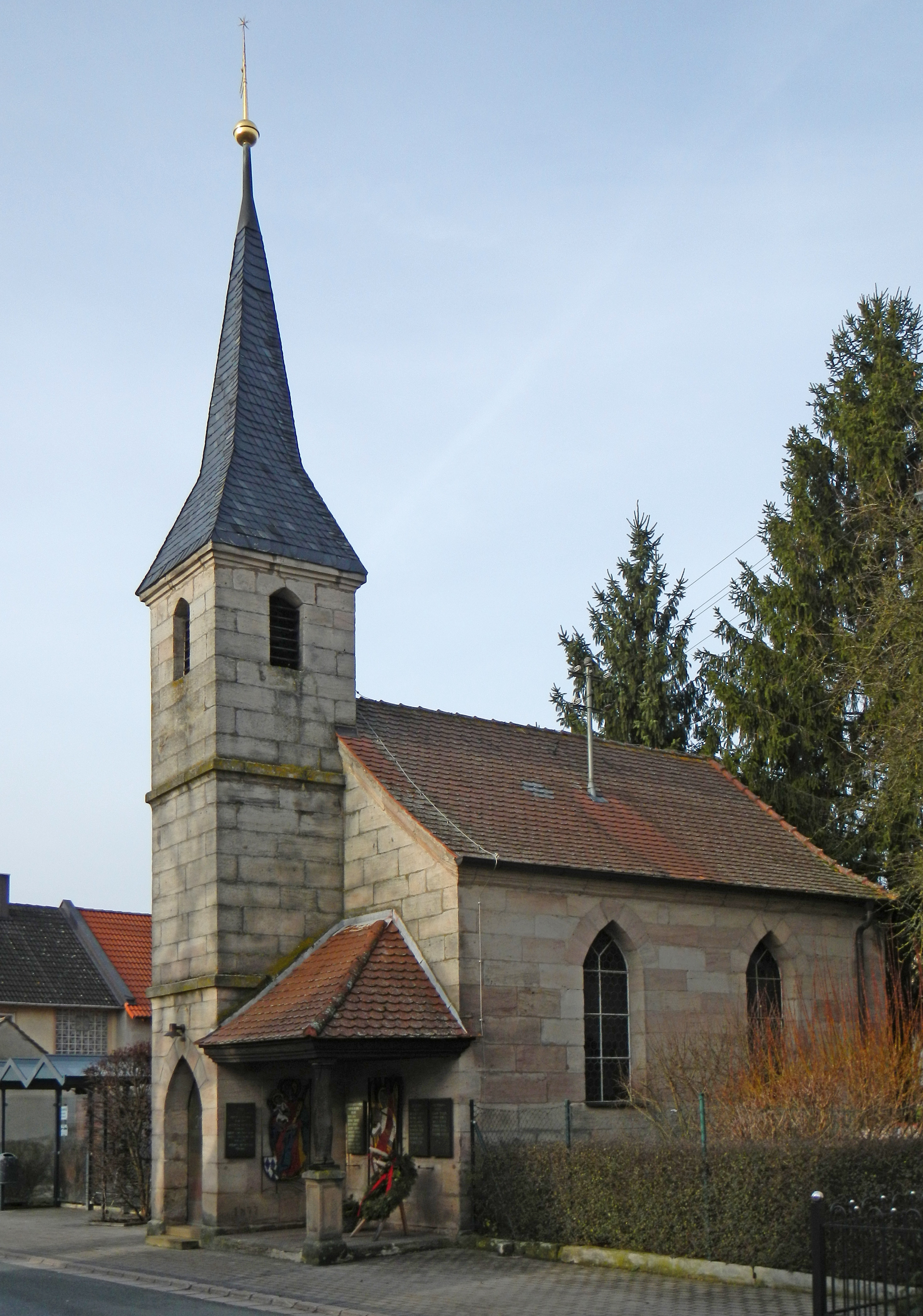 Katholische Kapelle St. Ottilia, Quaderbau mit Westturm, bez. 1877; mit Ausstattung in Hesselberg (Gemeinde Heßdorf) im Landkreis Erlangen-Höchstadt.